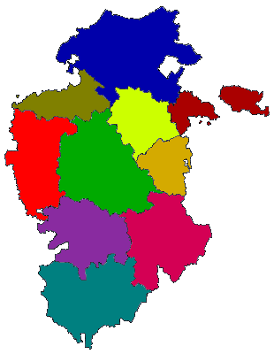 Mapa de las comarcas de la provincia Burgos (España) Comarcas más importantes de la región de Burgos: Merindades, Valle del Mena, Valle de Losa y Cuenca de Miranda, la Lora y la Bureba, la Cuenca del Arlanzón, la Cuenca del Arlanza y la Rivera del Duero, Comarca de la demanda y Comarca de Pinares.